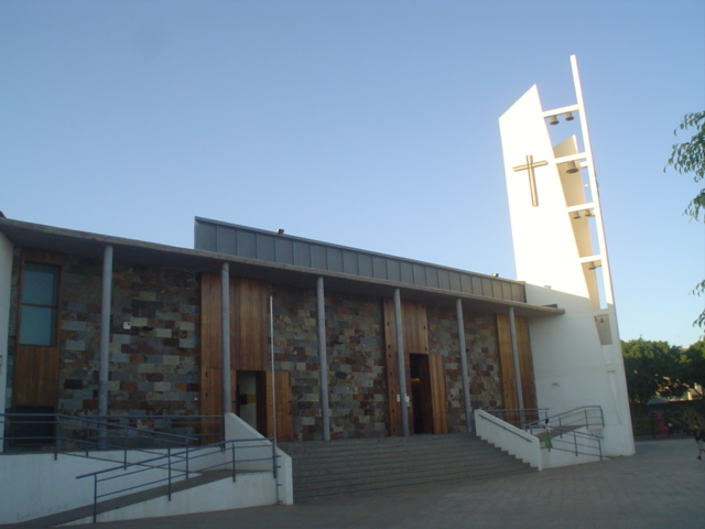 Iglesía Las Nieves (Finca España)